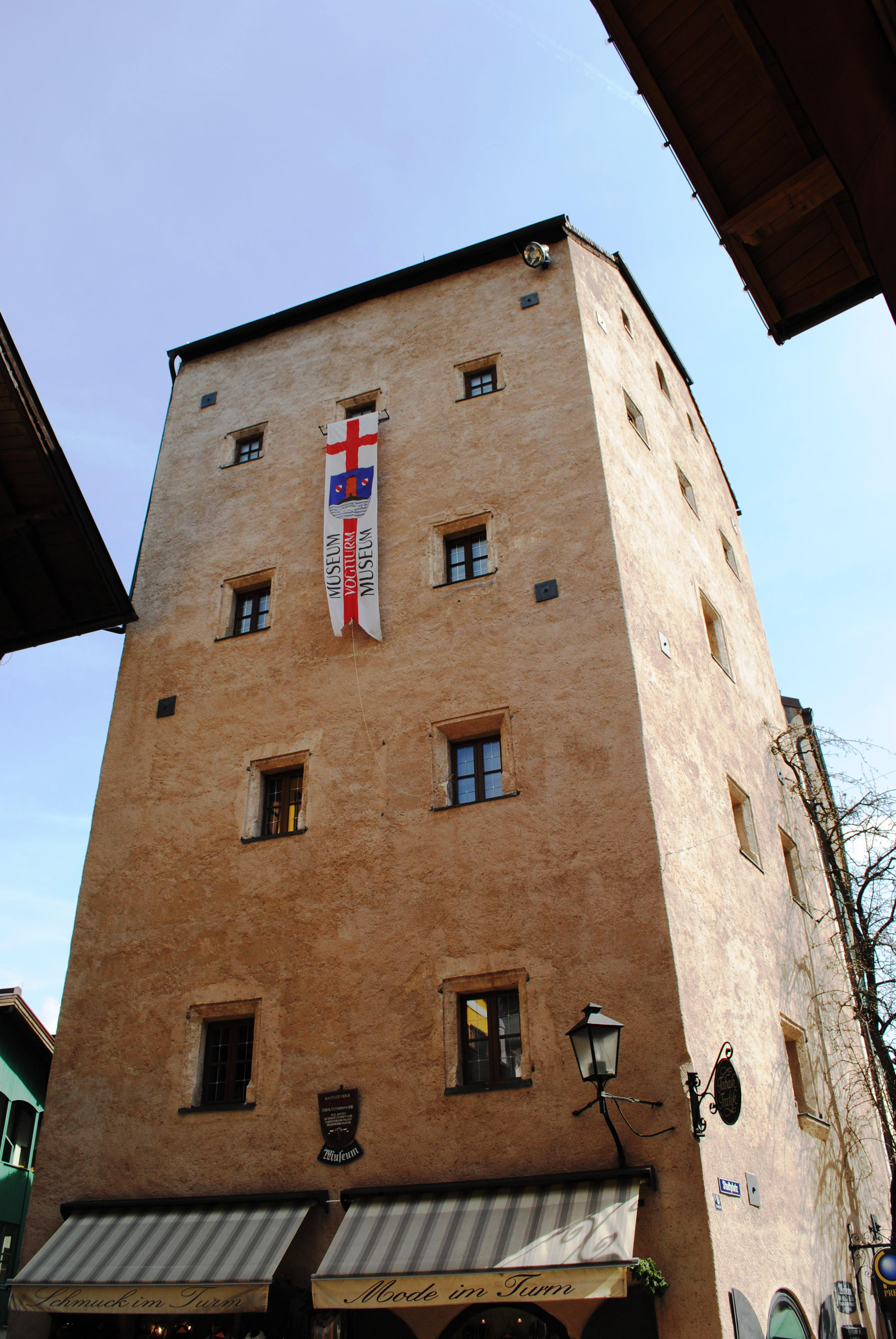 Kastenturm Zell am See